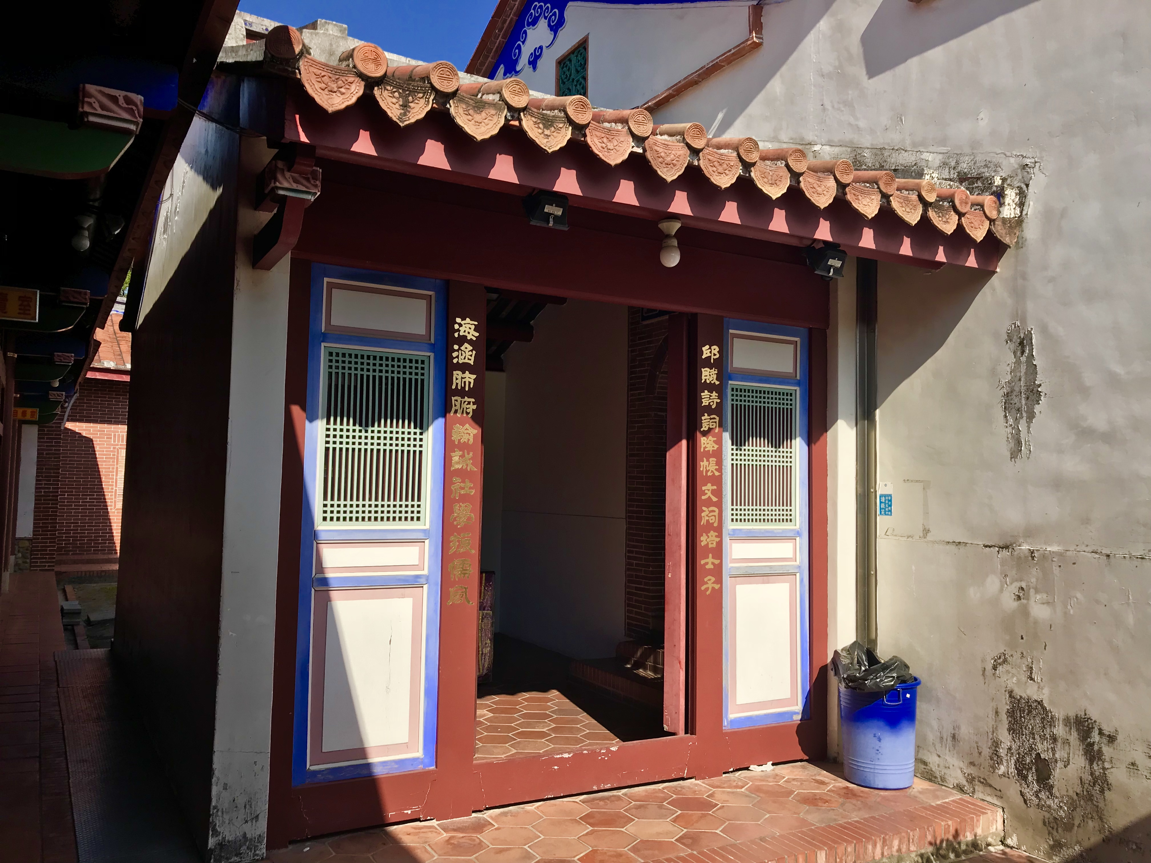 興賢書院邱海祠